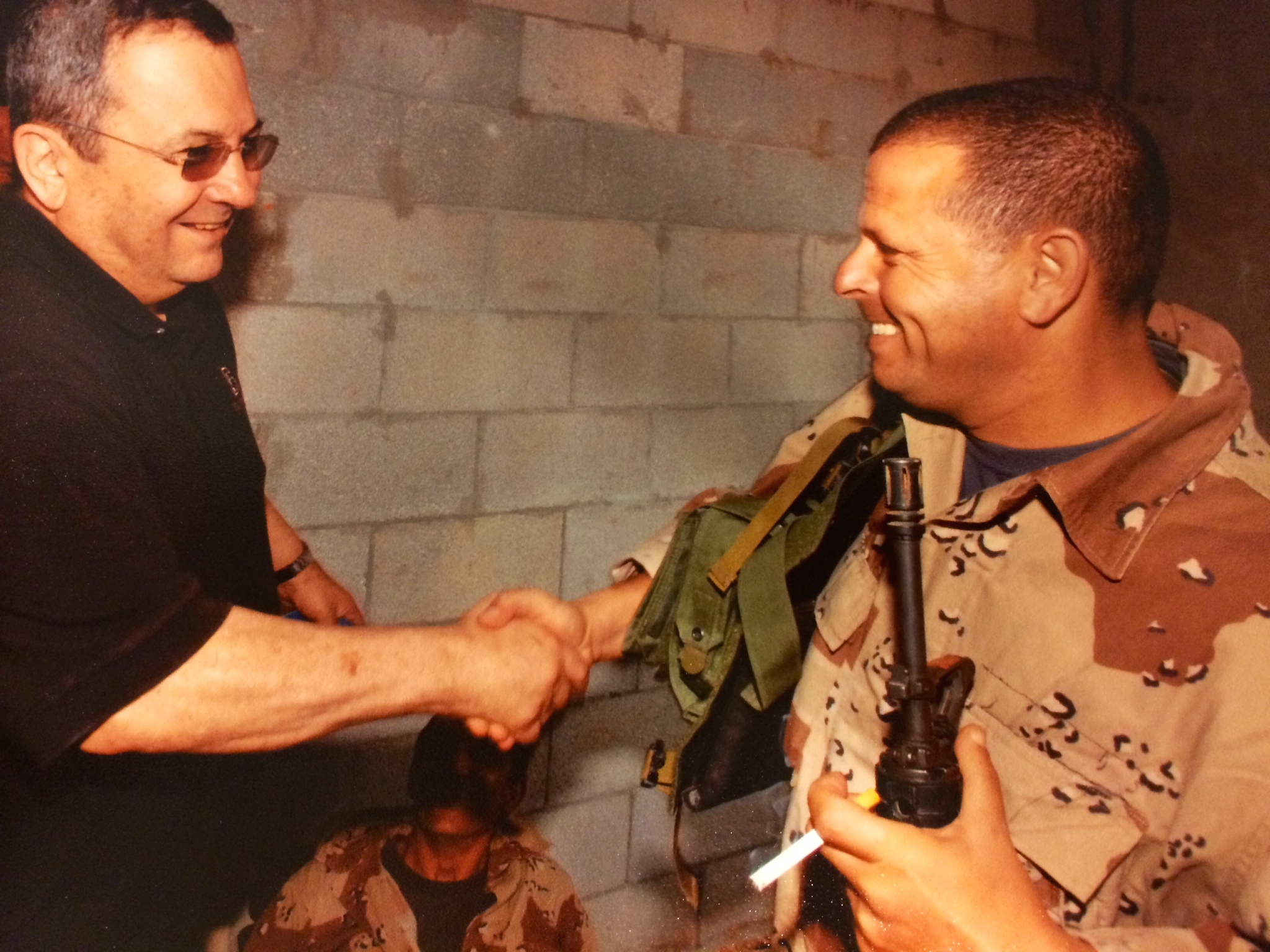 כבל בעת שירות מילואים ב-2007, עם שר הביטחון אהוד ברק שביקר ביחידה